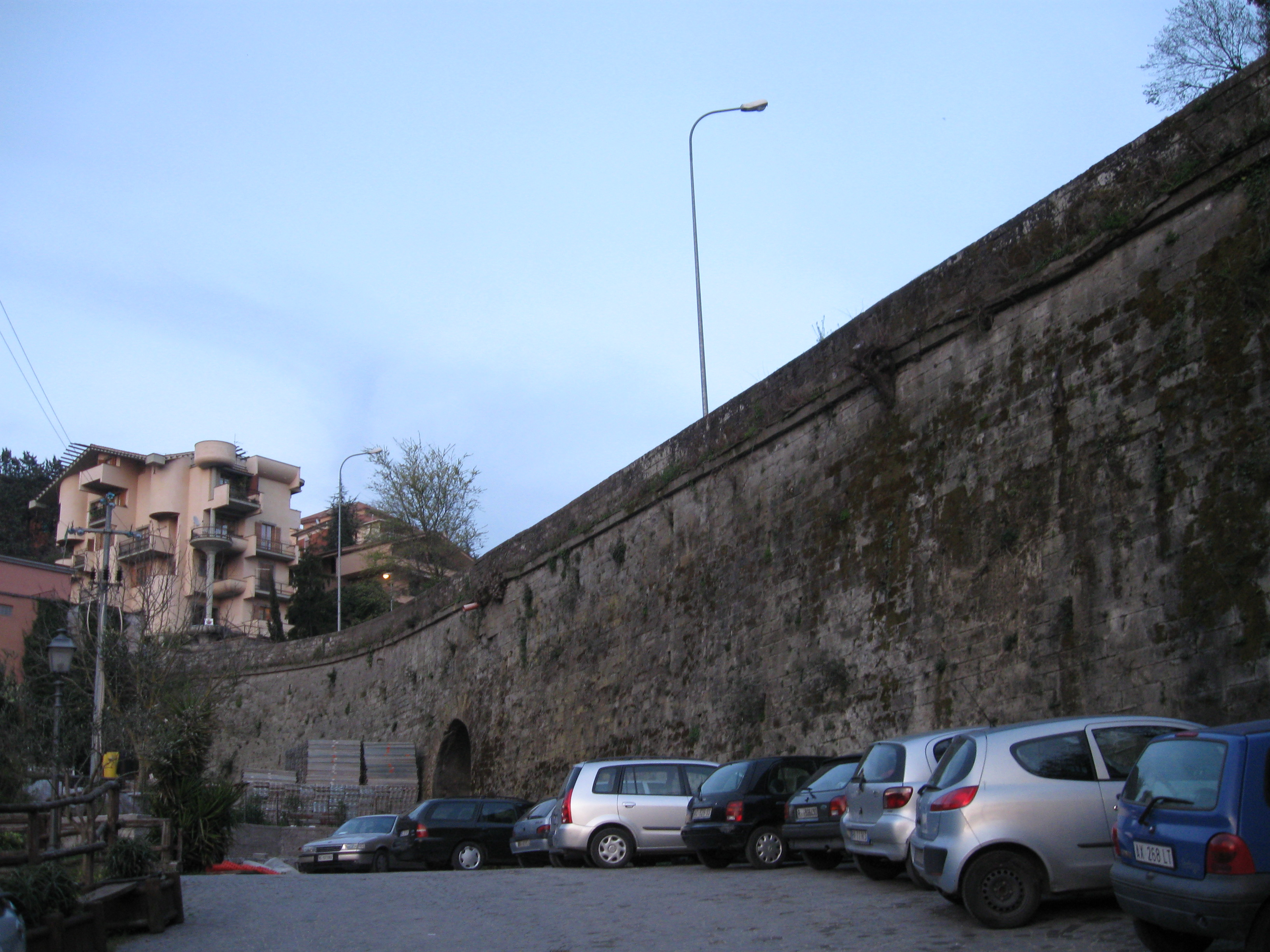 Il tratto iniziale del Ponte Gregoriano a Marino (RM) dal vallone della Marana delle Pietrare